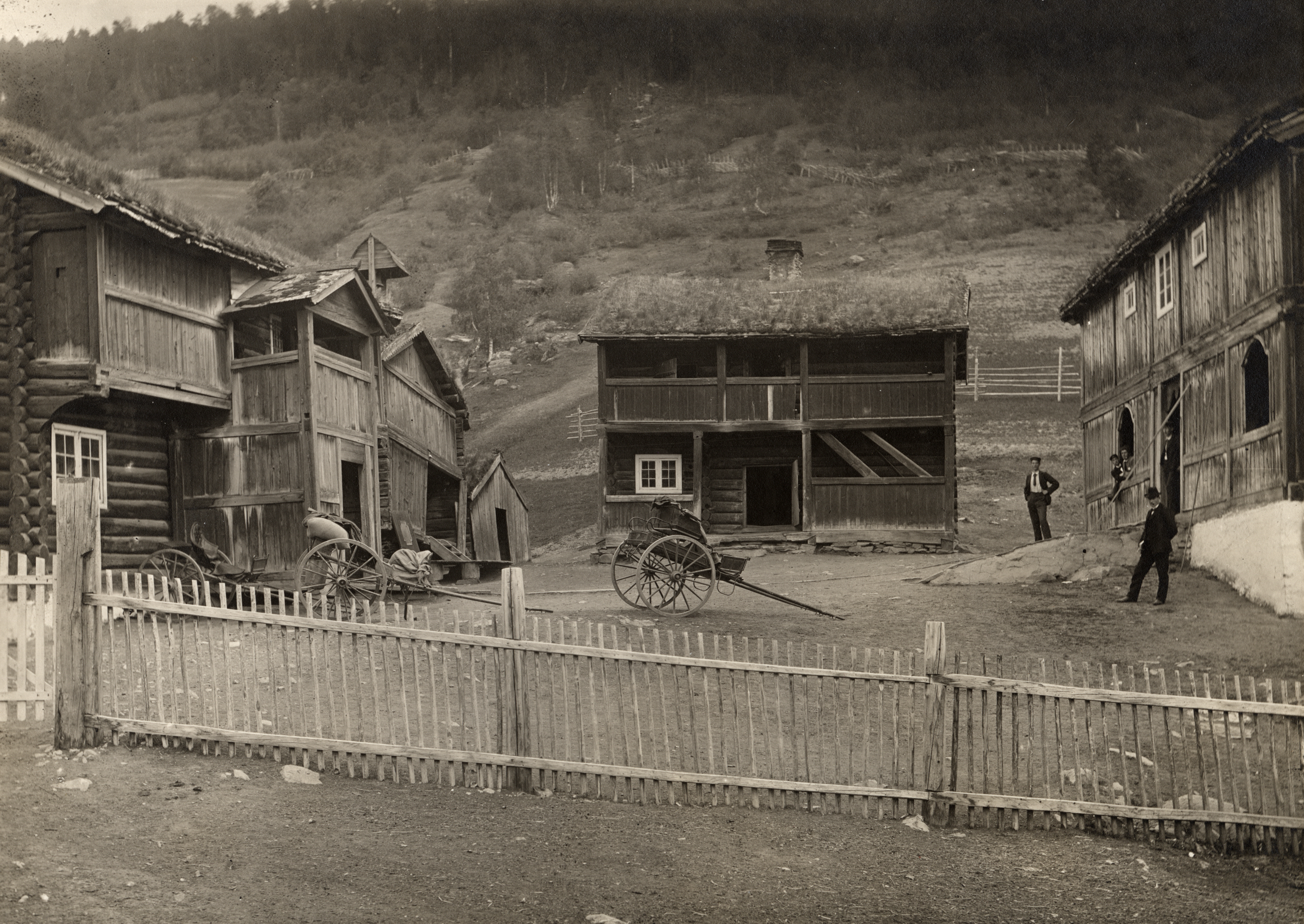 Ellingsbø i Heidal, Oppland Brent This image on crowdsourcing geotagging platform Fotodugnad